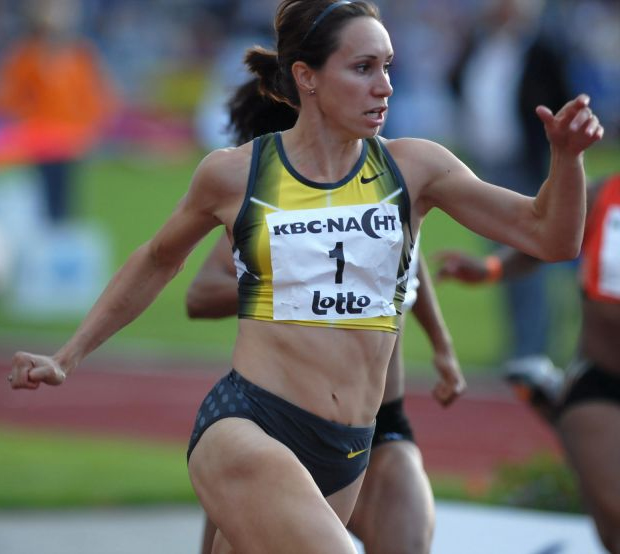 Kim Gevaert during Nacht van de Atletiek 2008